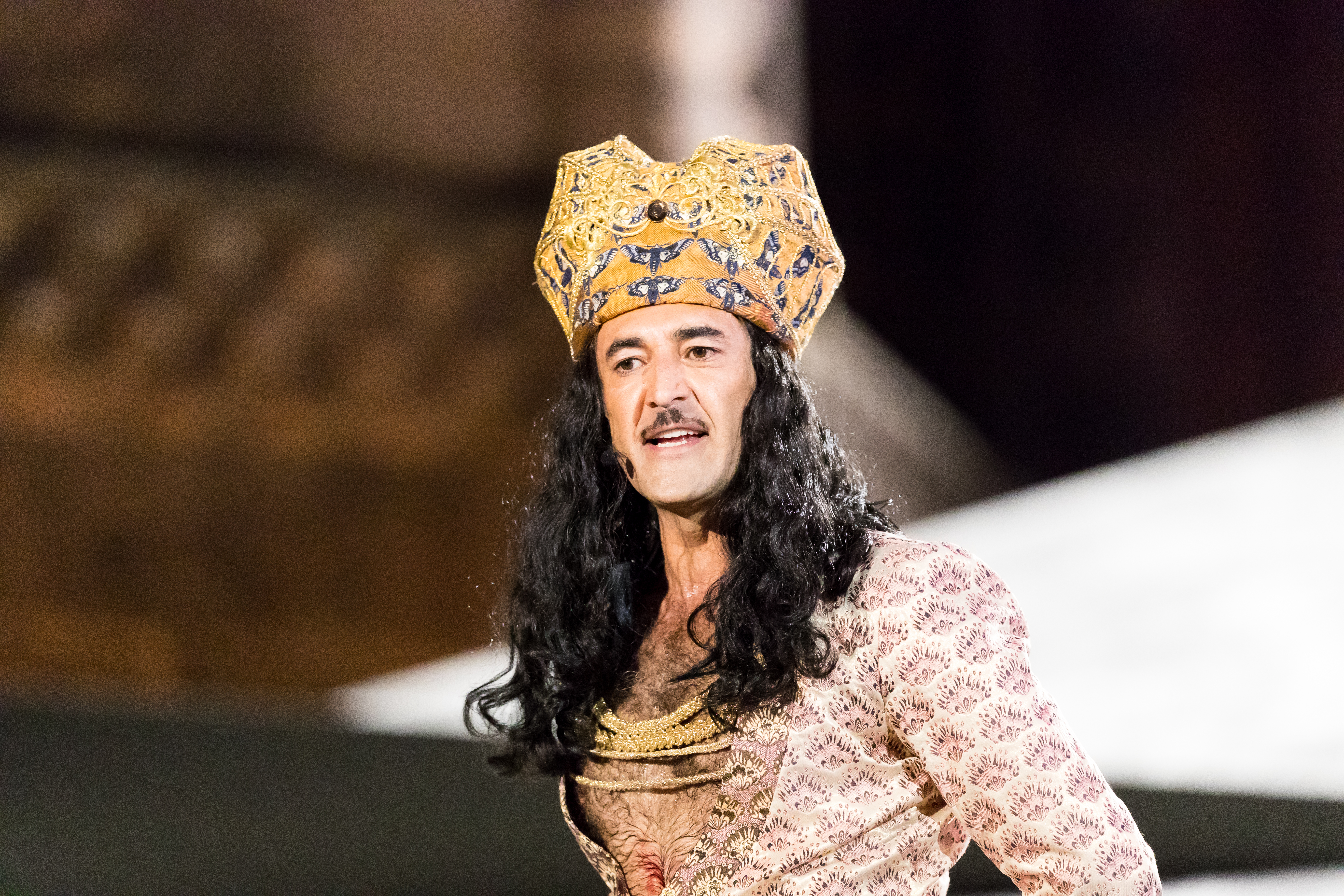 Mehmet Kurtuluş during Nibelungenfestspiele "GLUT. Siegfried von Arabien." at Rheinland-Pfalz, Worms, , Germany on 2017-08-01, Photo: Sven Mandel